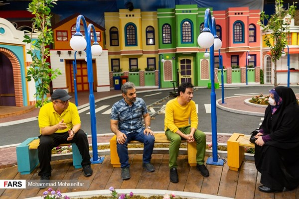 داریوش فرضیایی به همراه احمد درویشعلی پور و مسلم آقاجان زاده در مصاحبه ای با خبرگزاری فارس